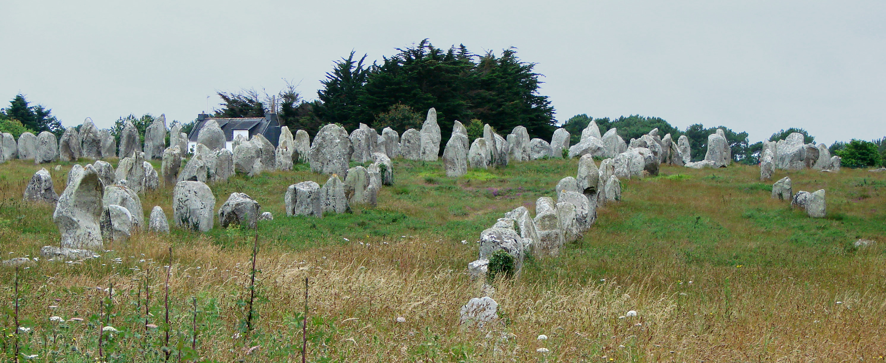 Les alignements de Kermario à Carnac.